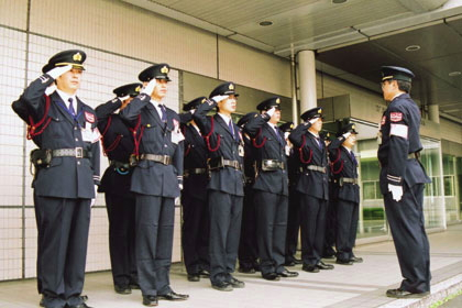 民間警備会社の点呼風景